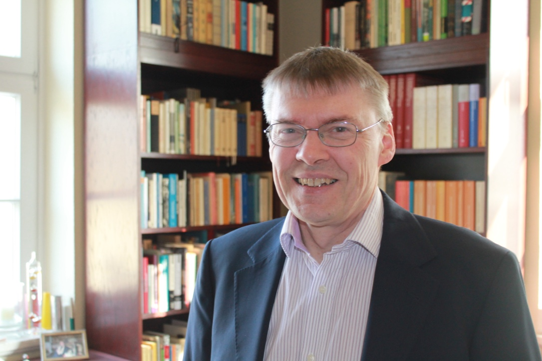 Jürgen Egyptien 2016 in seinem privaten Arbeitszimmer in Aachen.